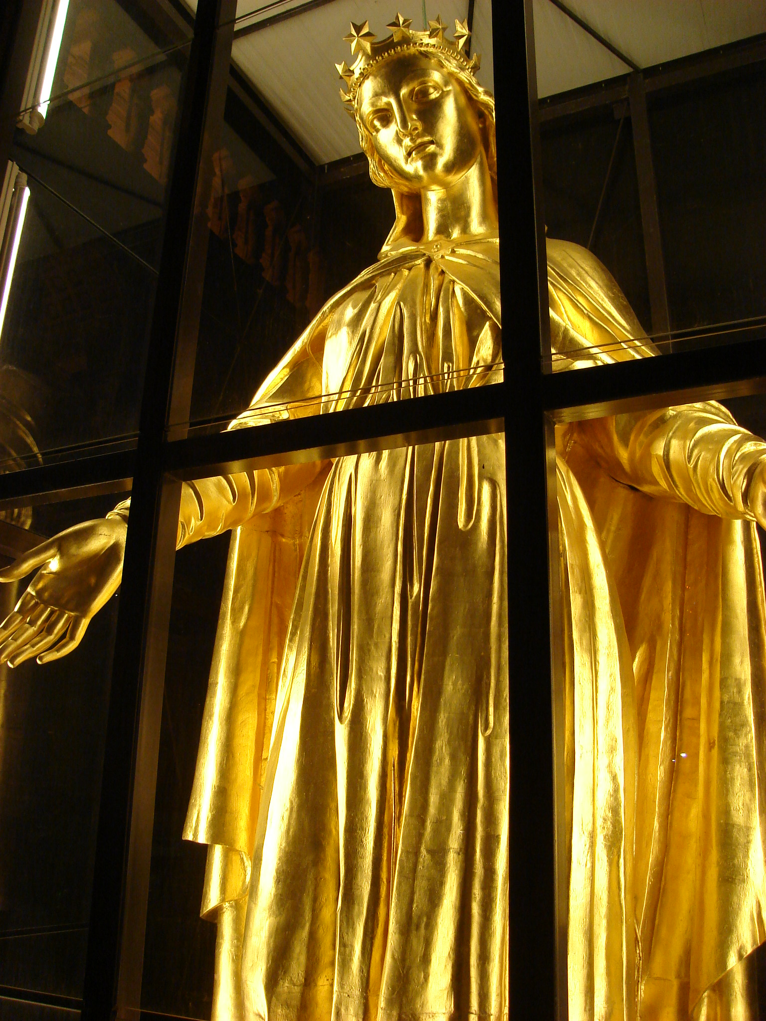 La statue de la vierge dorée descendue de la Chapelle. Fourvière,Lyon